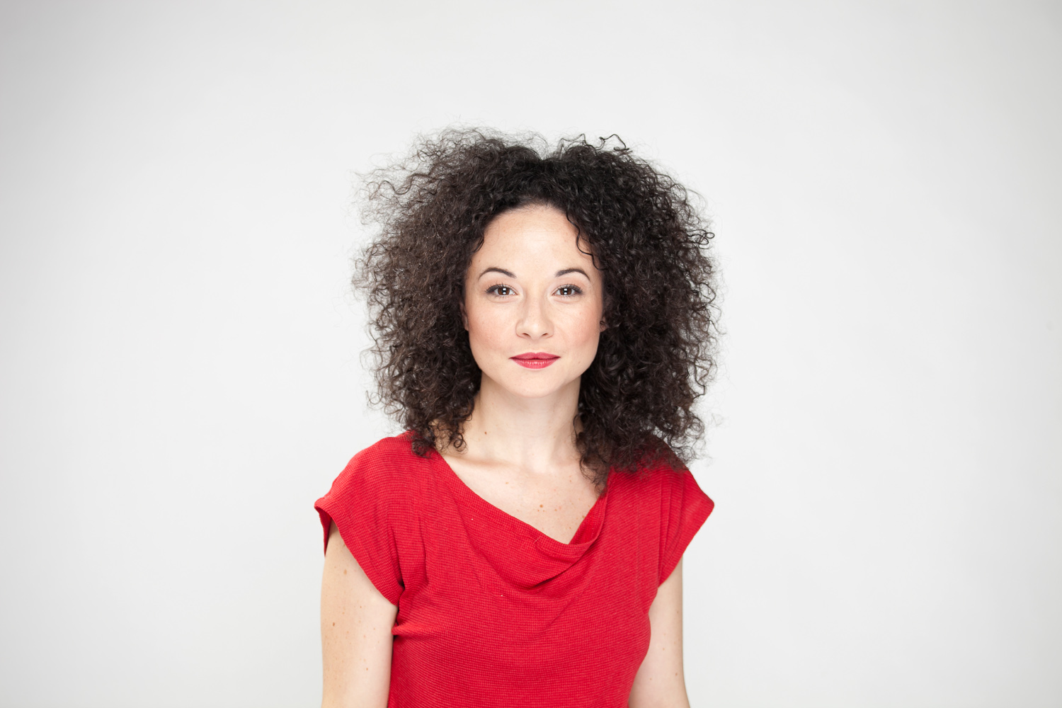 רוני שובל